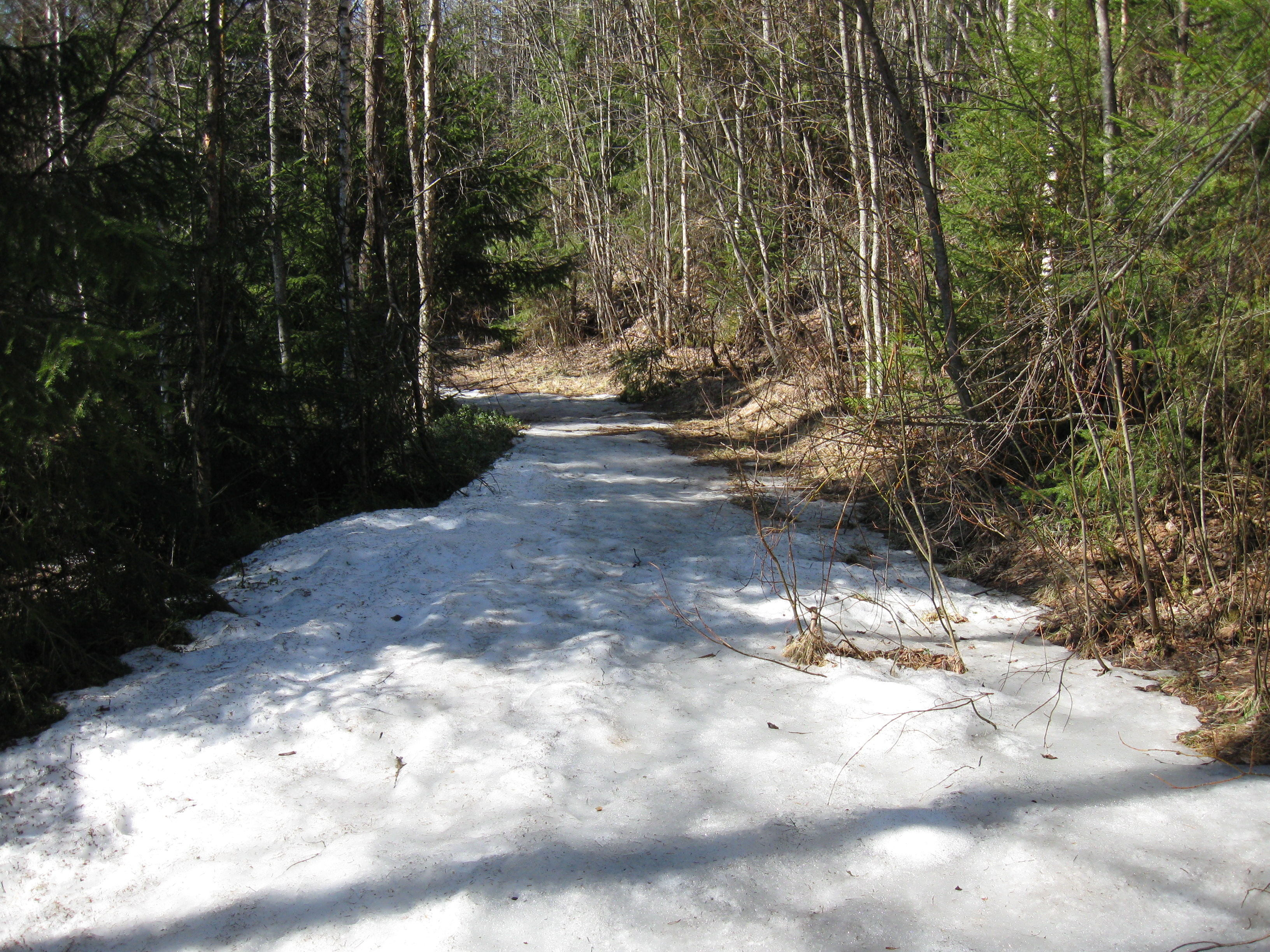 Polannetta eli jäätynyttä tienpohjaa Poikajoen törmällä Isterinkoskella Muhoksella.